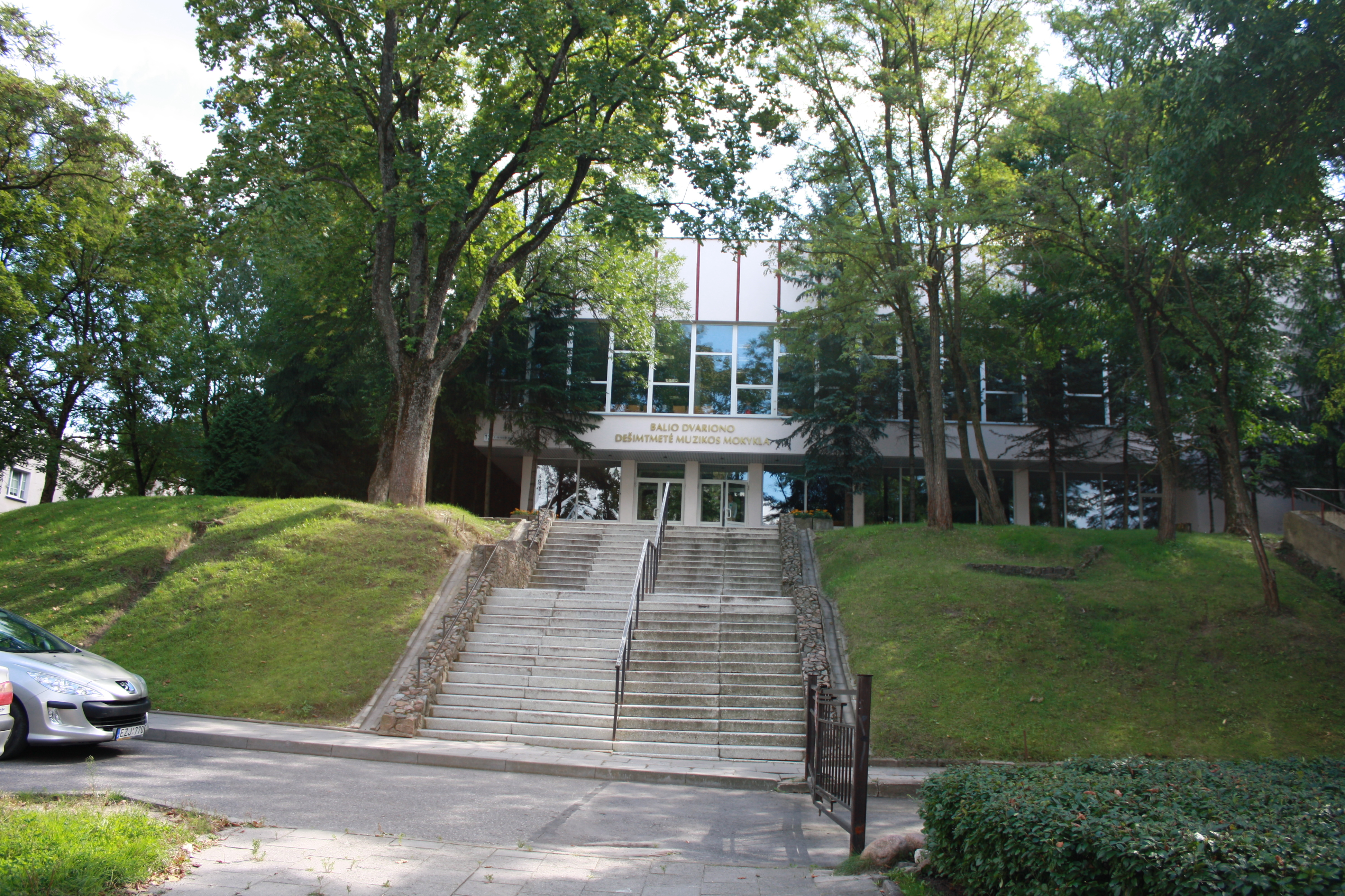 Vilniaus Balio Dvarionio dešimtmetė muzikos mokykla